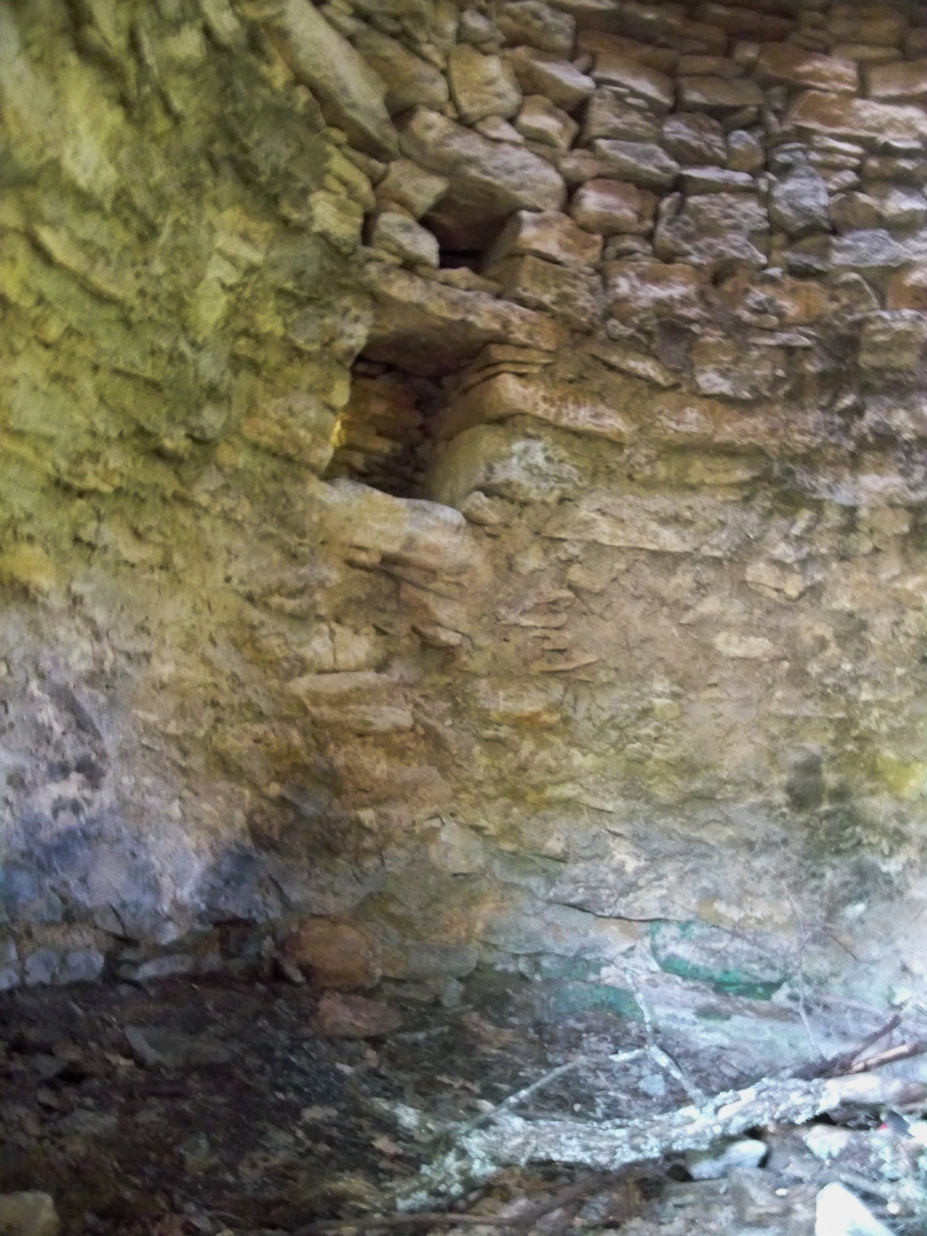 Intérieur de Cabanon pointu, en pierre sèches, près de Mane, Alpes-de-Haute-Provence, France